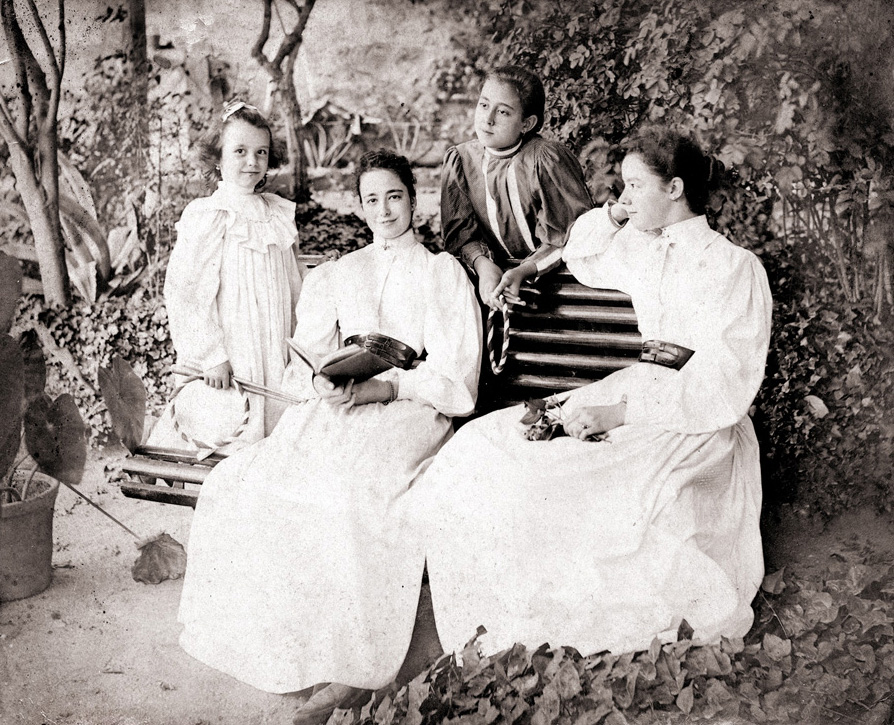 Las cuatro hijas de Francesc Brosa i Casanobas, en el jardín de la casa de Tiana, 1896: (de izquierda a derecha) Mercedes, Antonia, Pepita y Teresa.